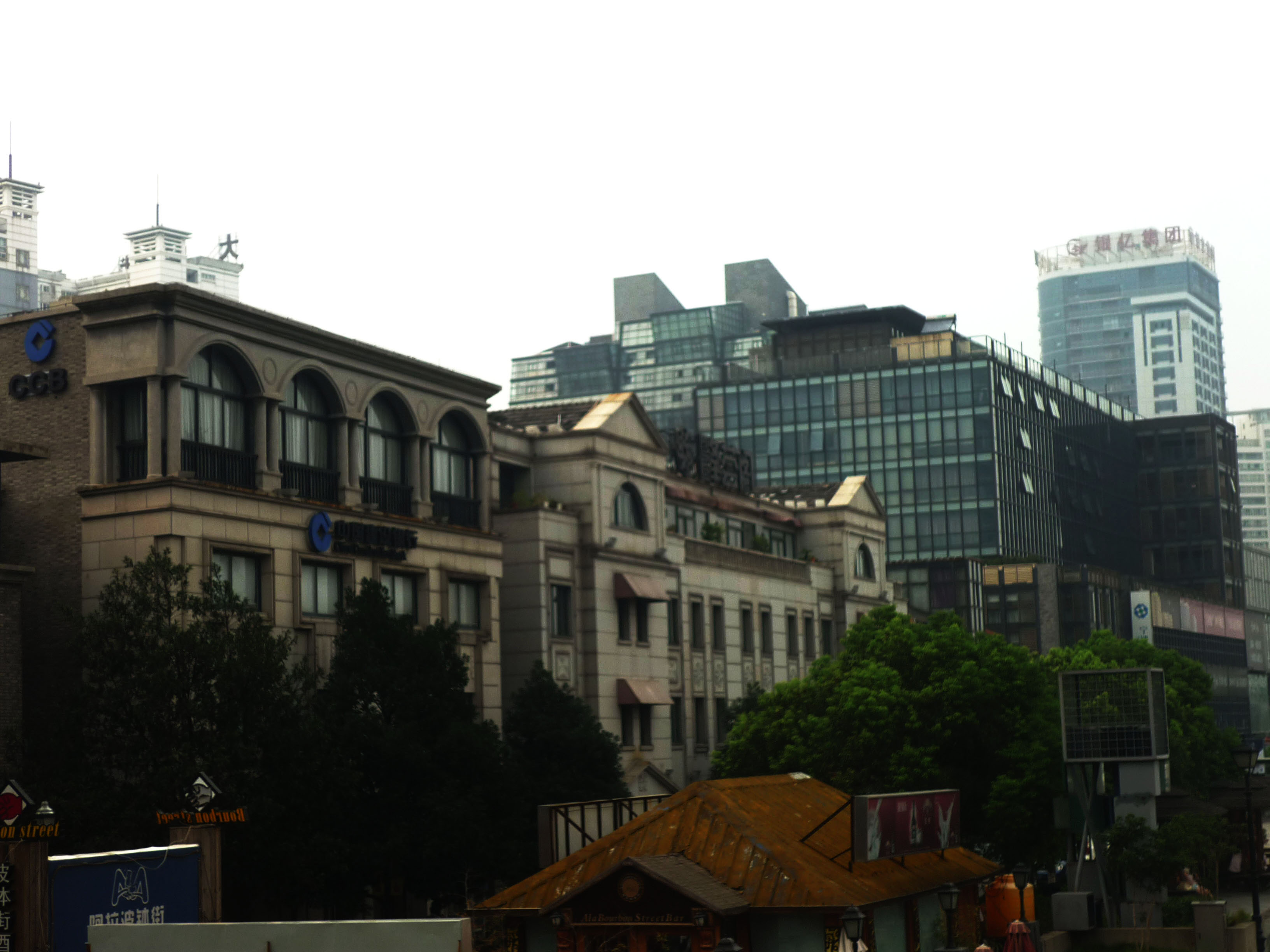 日间的宁波老外滩